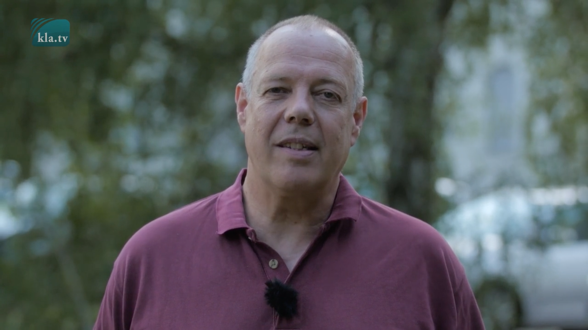 Interview mit Christoph Hörstel. Christoph Hörstel über Trump: Medien beschreiben Affentheater – niemals die wesentlichen Dinge | 24. Mai 2017